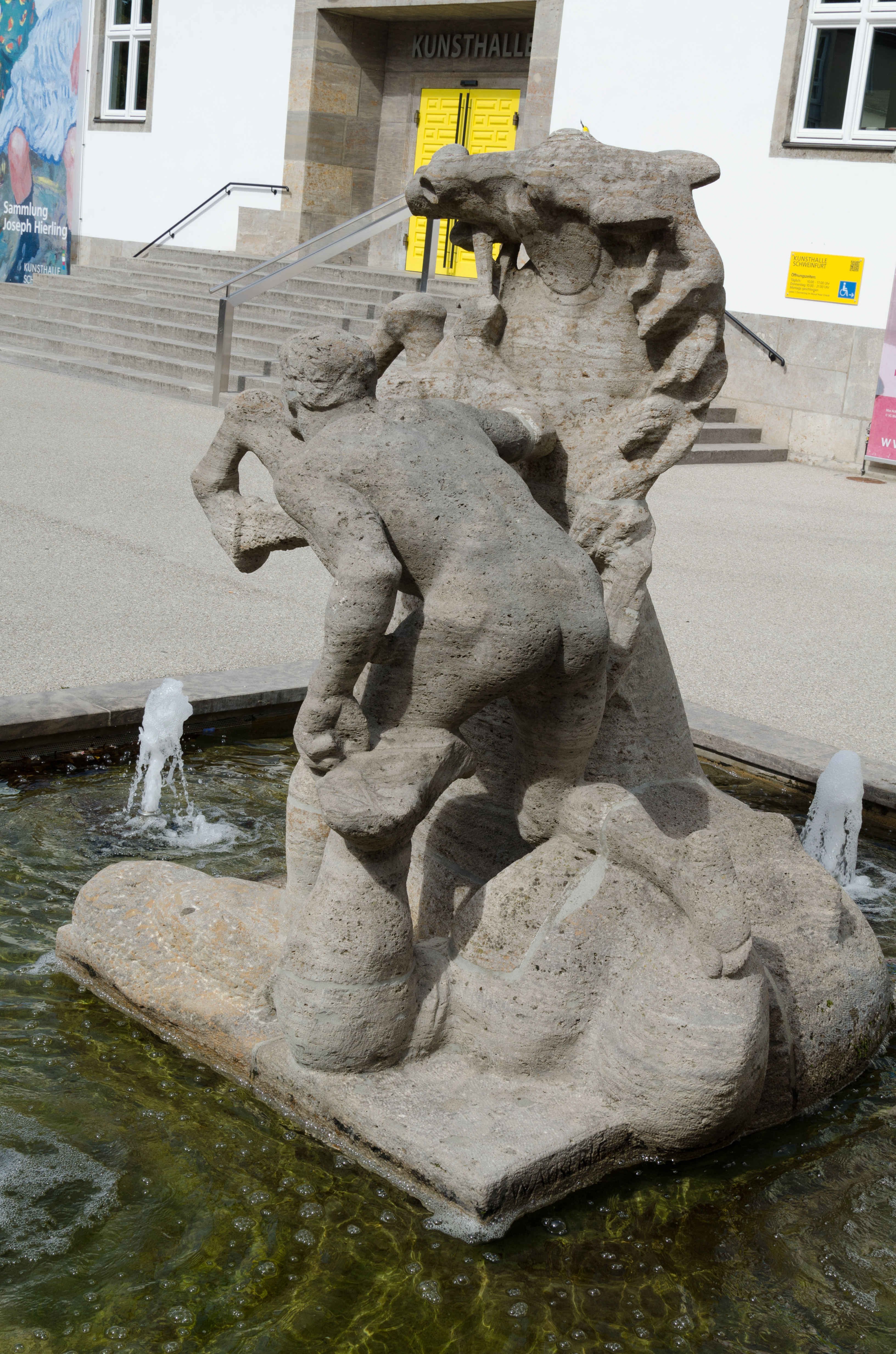 Schweinfurt, Rüfferstraße, Brunnen